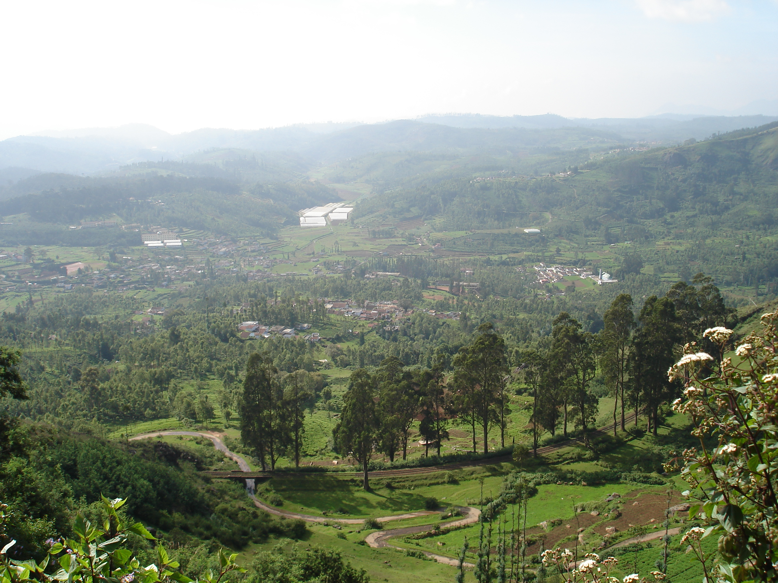 ketti valley,ooty,tamilnadu